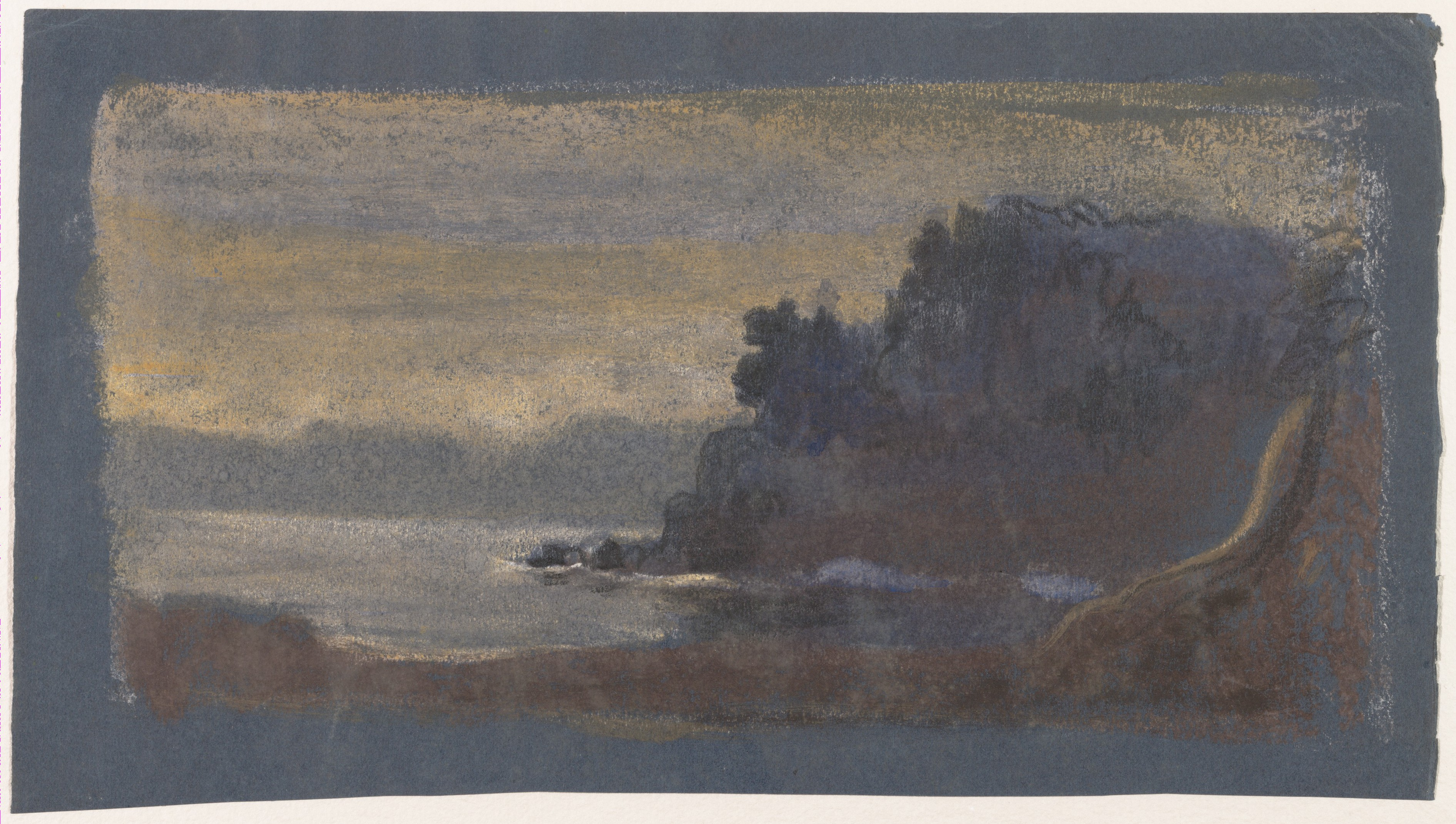 Drawing; Drawings